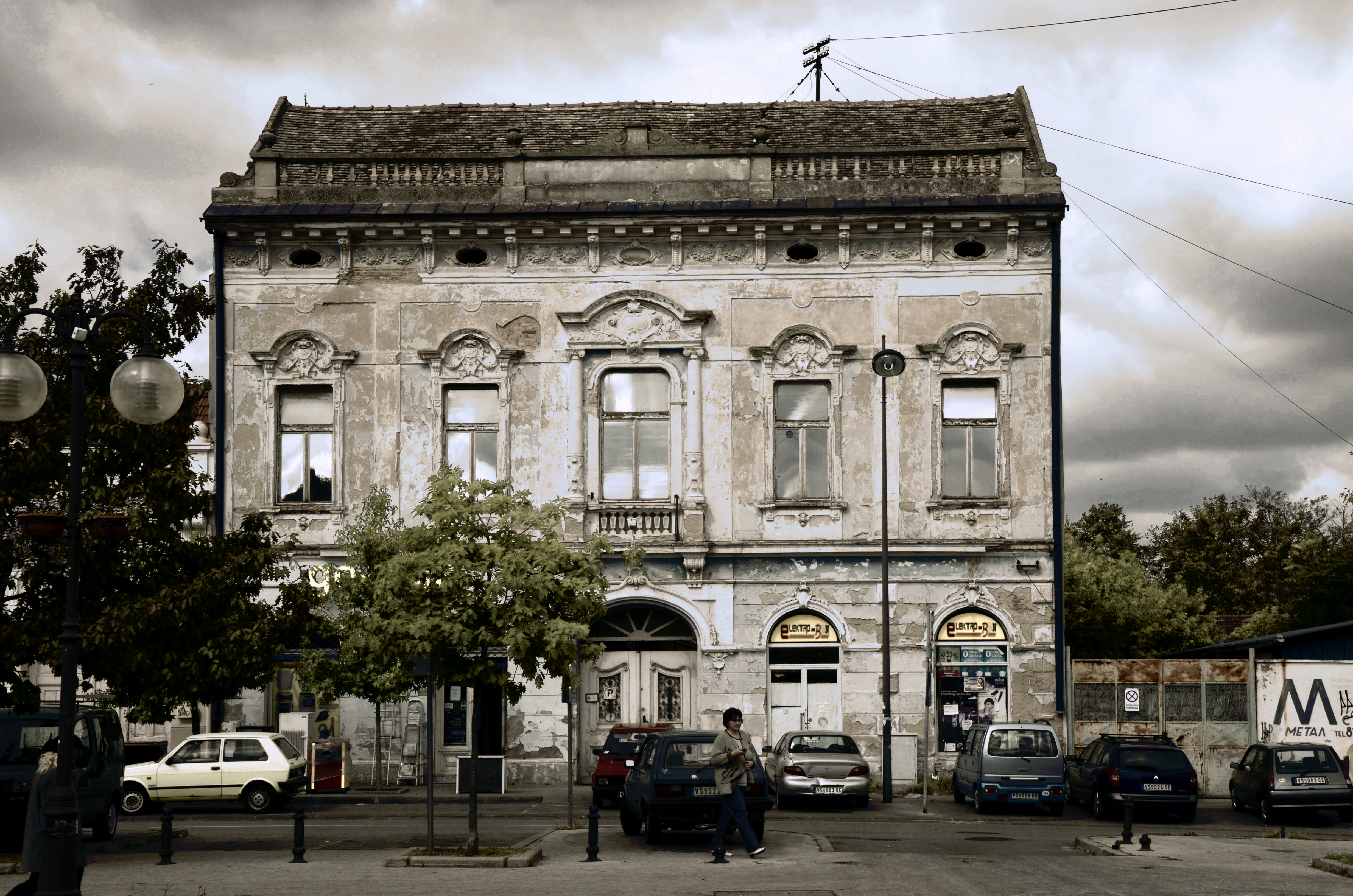 Зграда на Тргу Св. Теодора Вршачког (бивши Трг Саве Ковачевића) број 33 у Вршцу